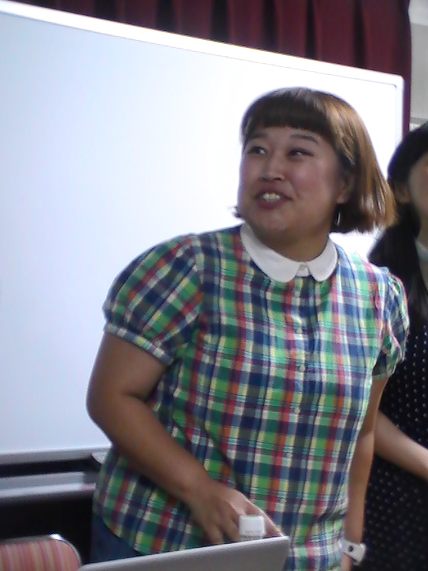 松丸ほるもん (2017年6月10日)